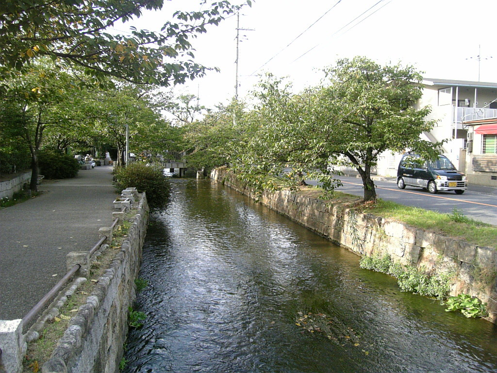 玉串川（大阪府八尾市）